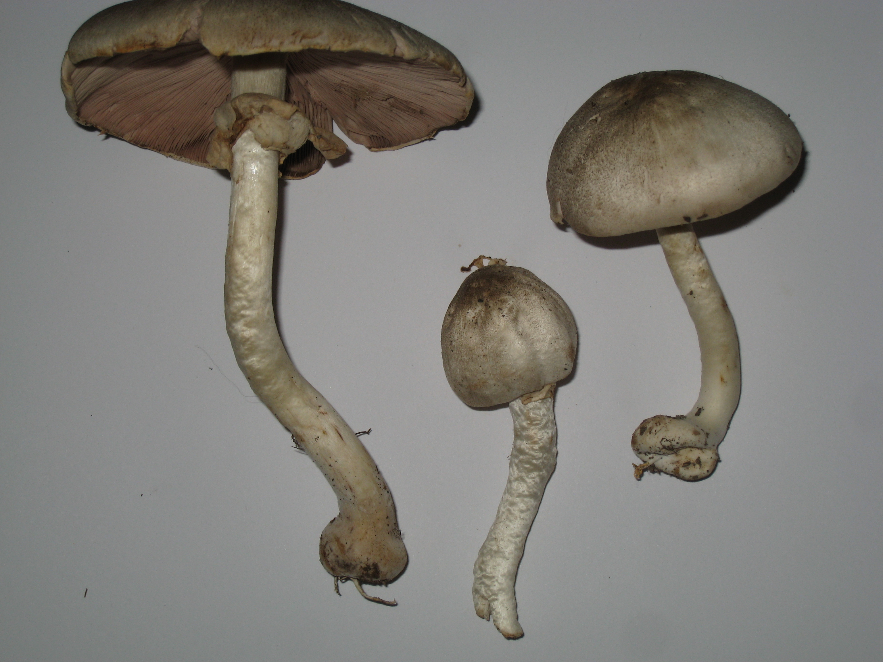 Agaricus placomyces